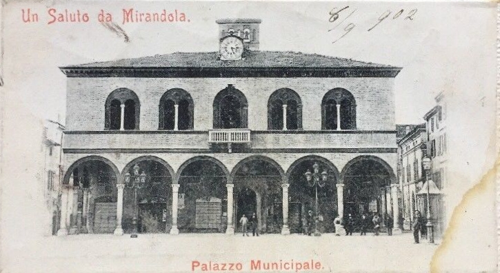 Palazzo municipale di Mirandola